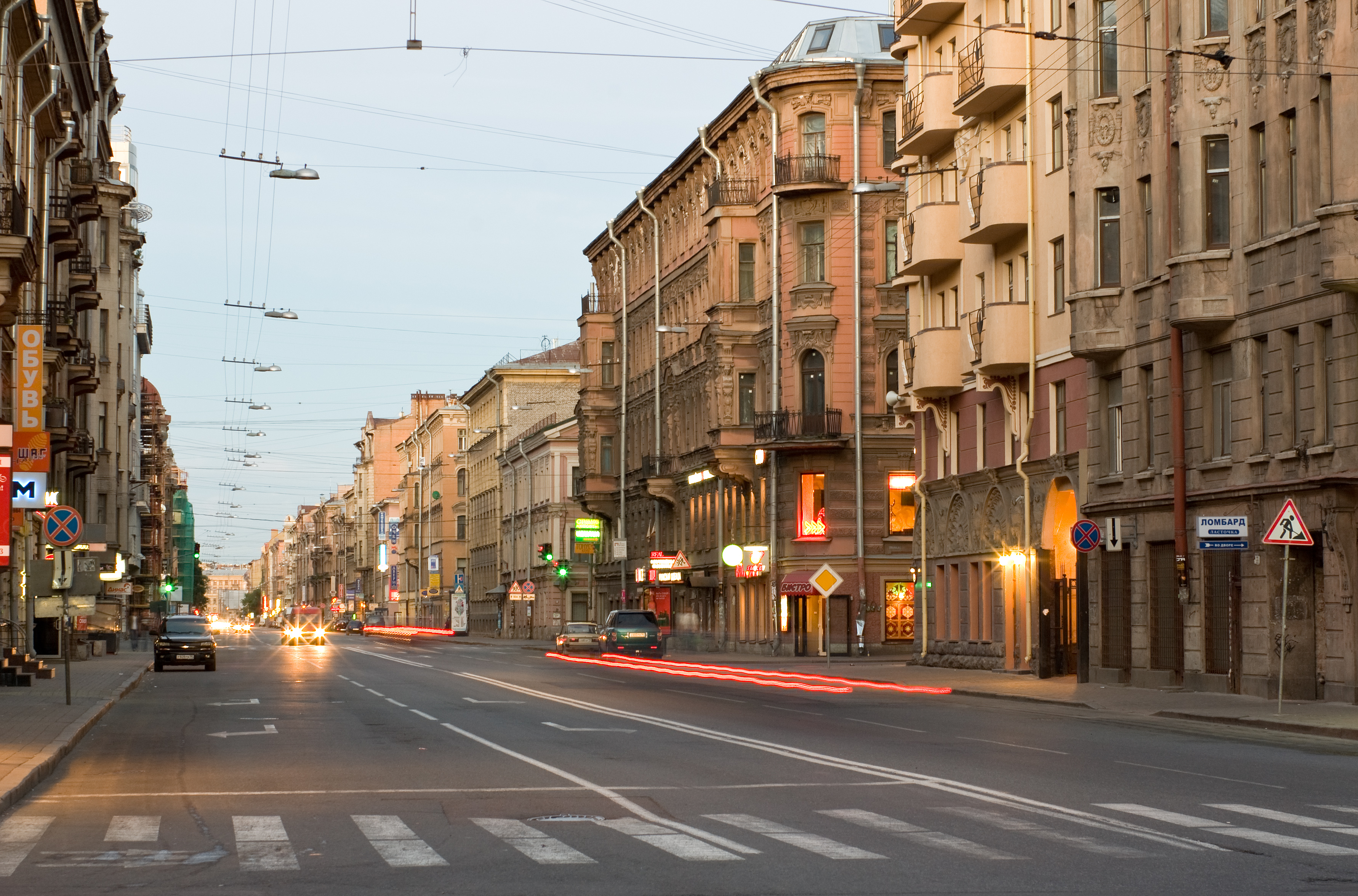 улица Восстания (ночь), Санкт-Петербург. Вид с Кирочной улицы.